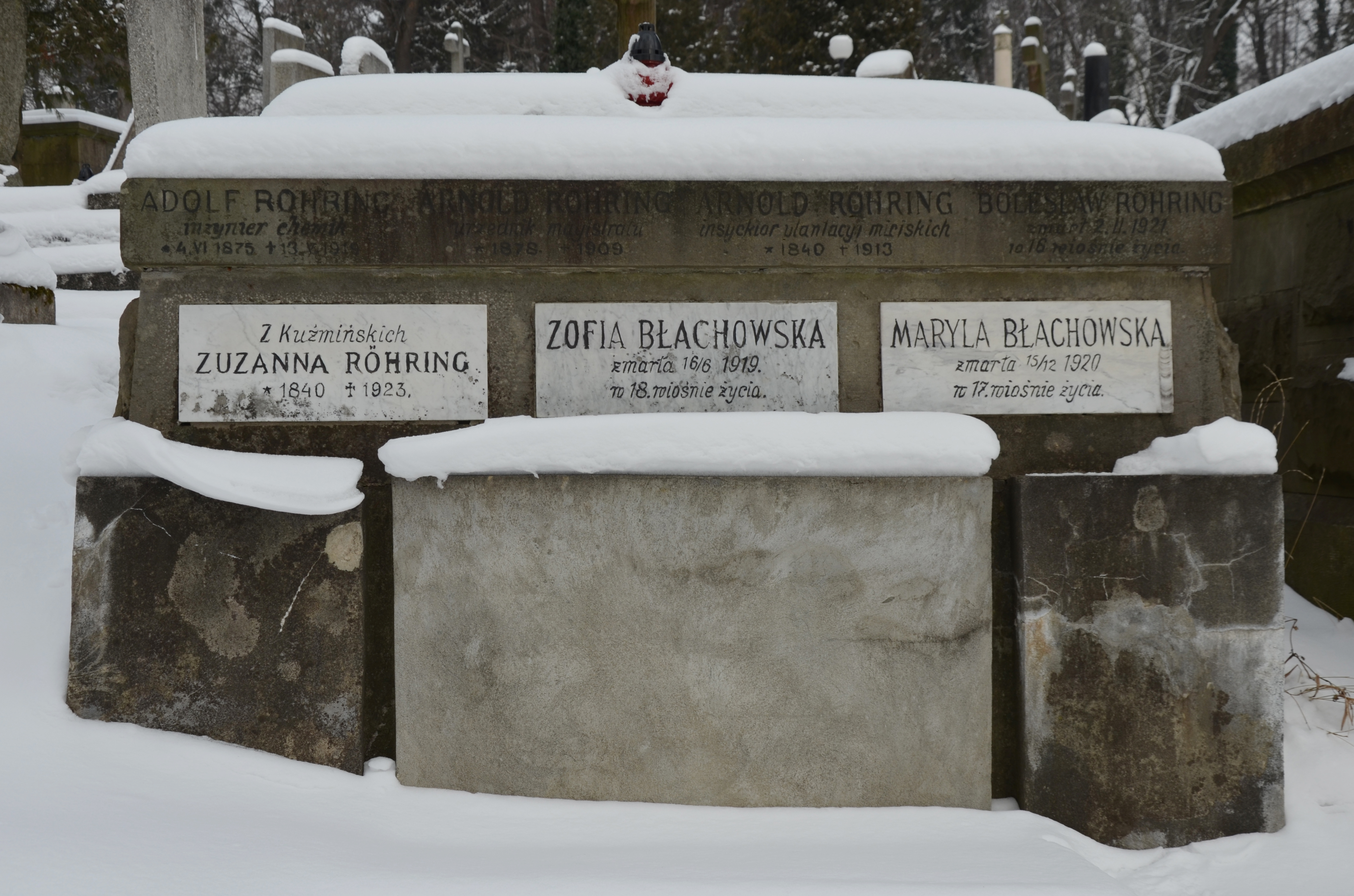 Гробівець Рерінгів на Личаківському цвинтарі у Львові.